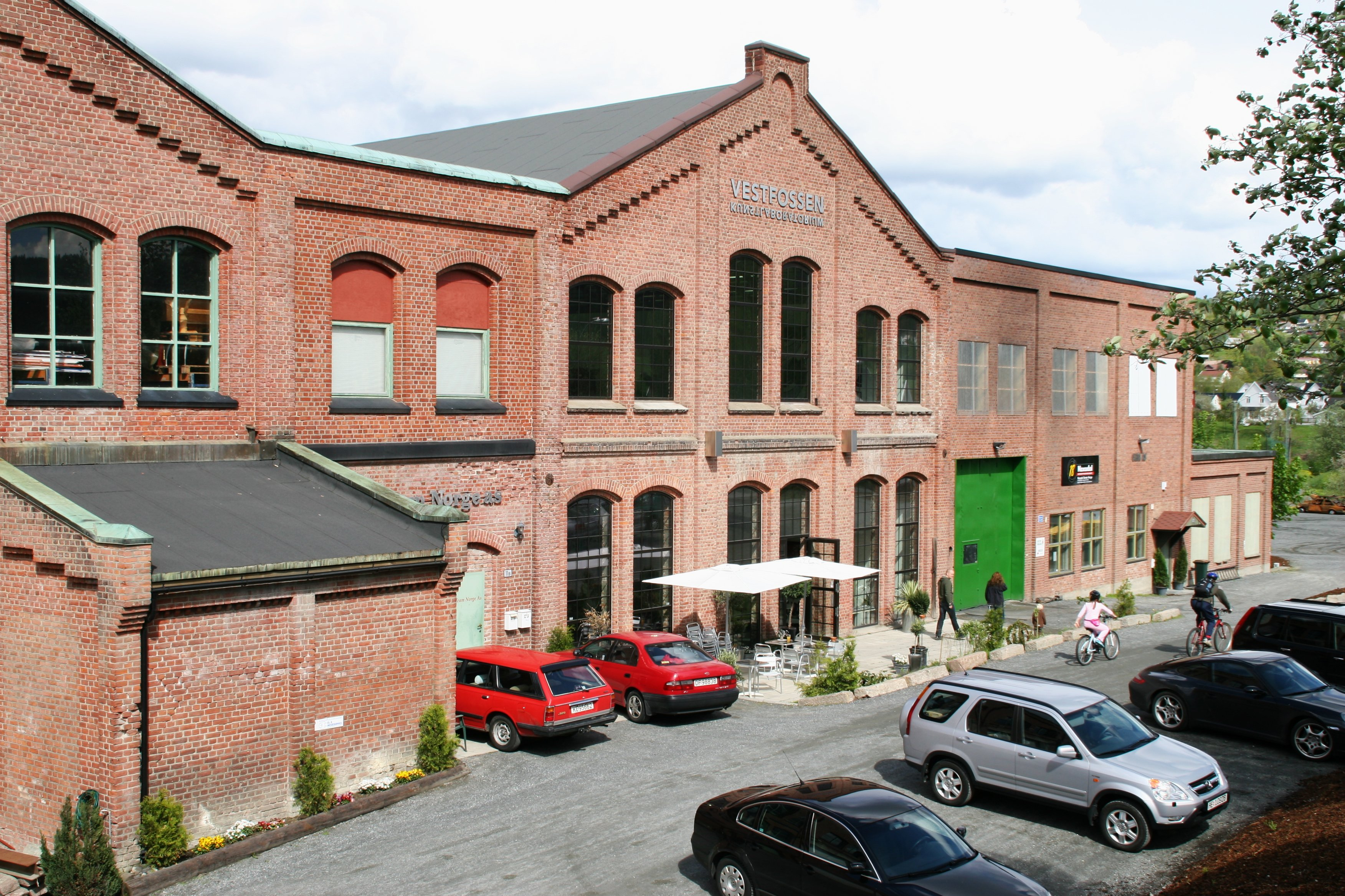 Vestfossen Kunstlaboratorium in Vestfossen, Norway